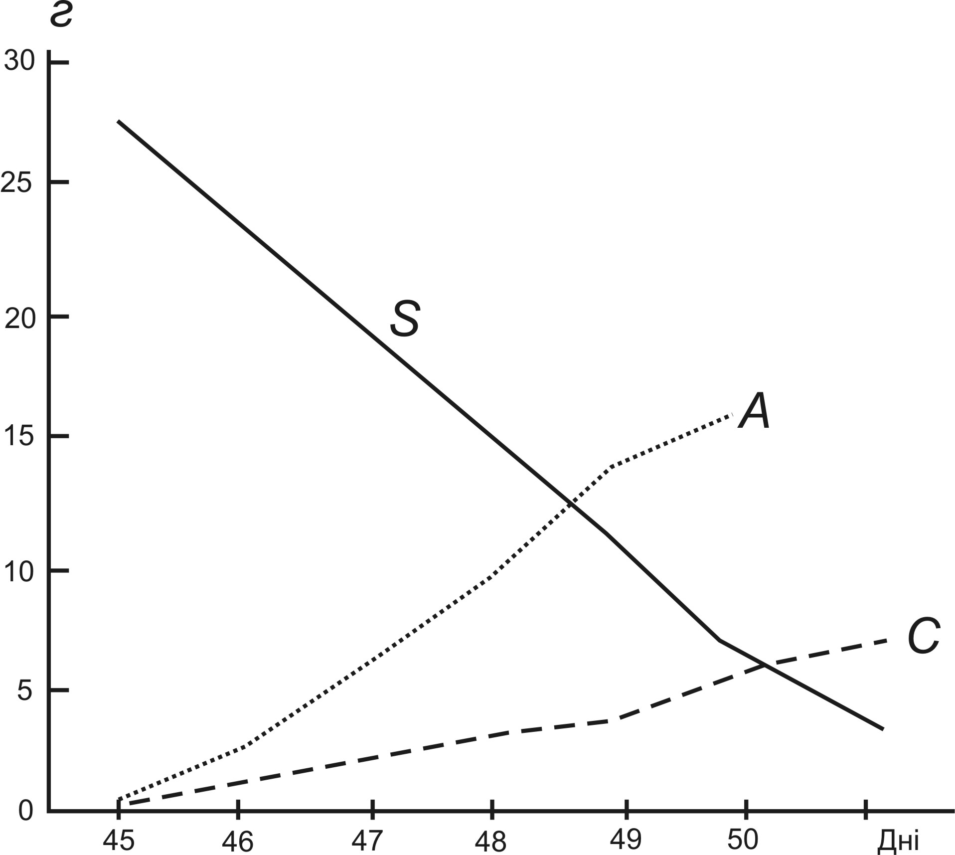 Allelospolia